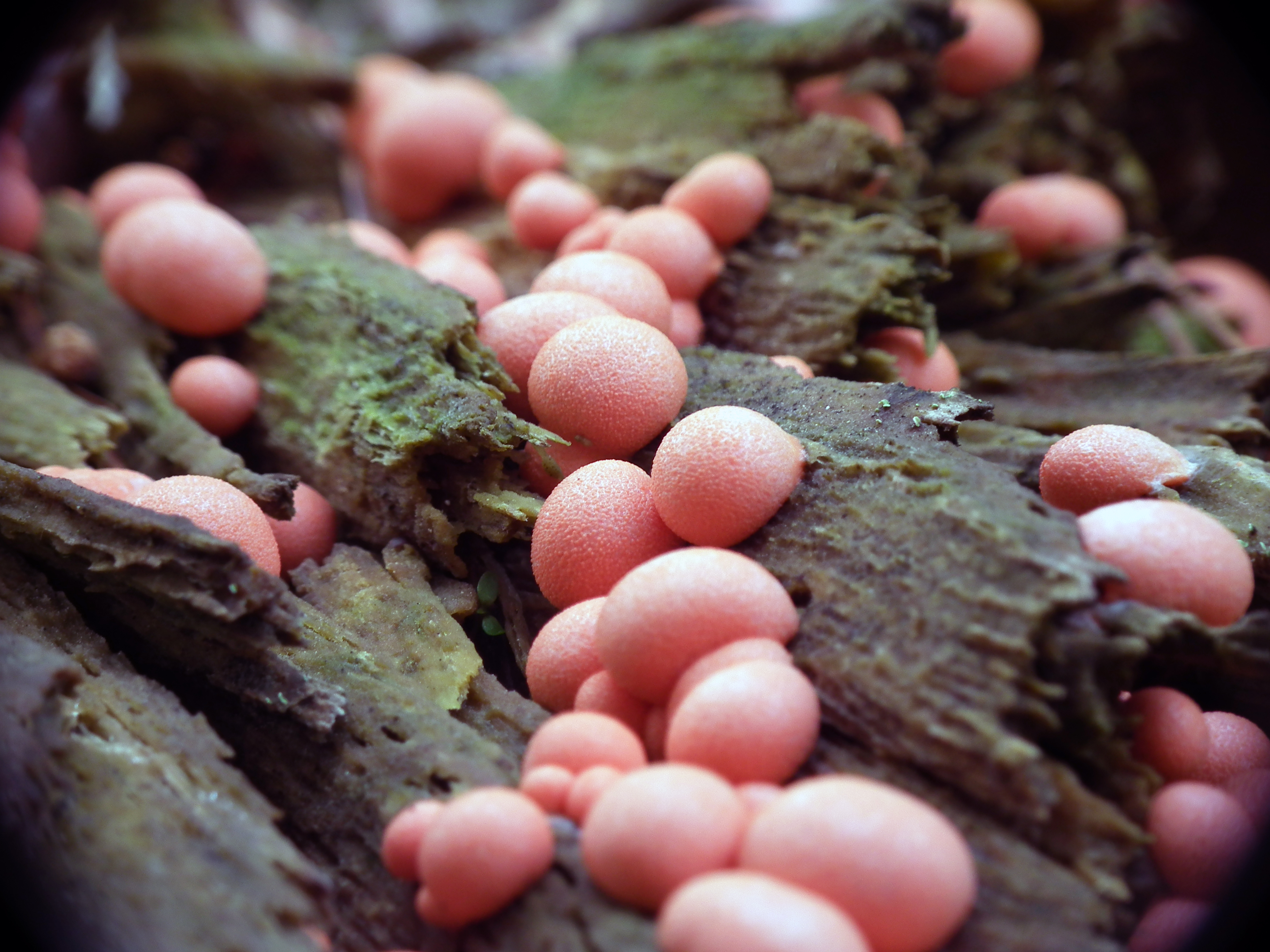 Lycogala epidendrum. Slovenský raj, Slovakia.